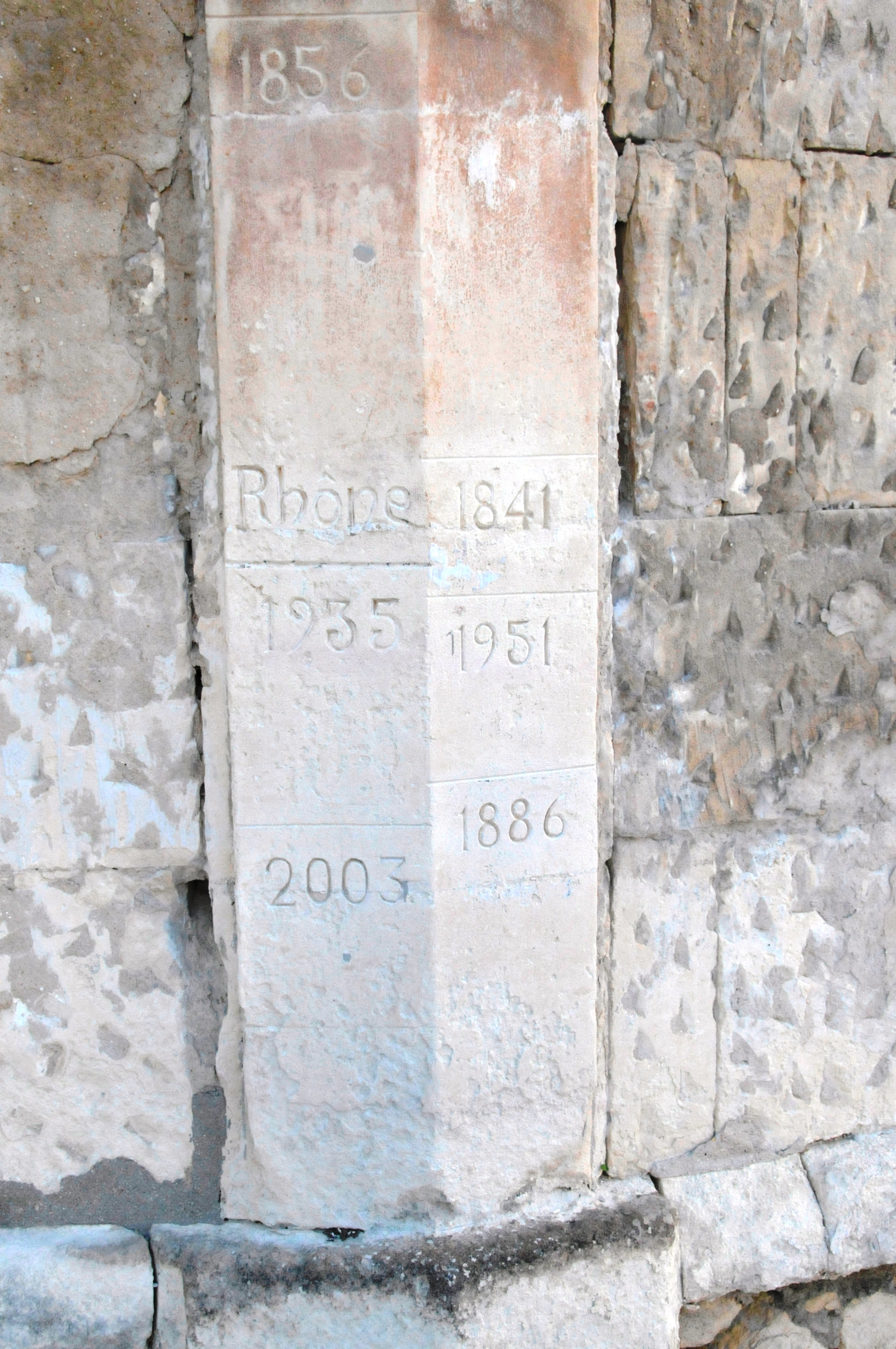 Hochwassermarken in Boulbon, Provence, an der Hausecke Place Gilles Leontin und Rue de l'Église